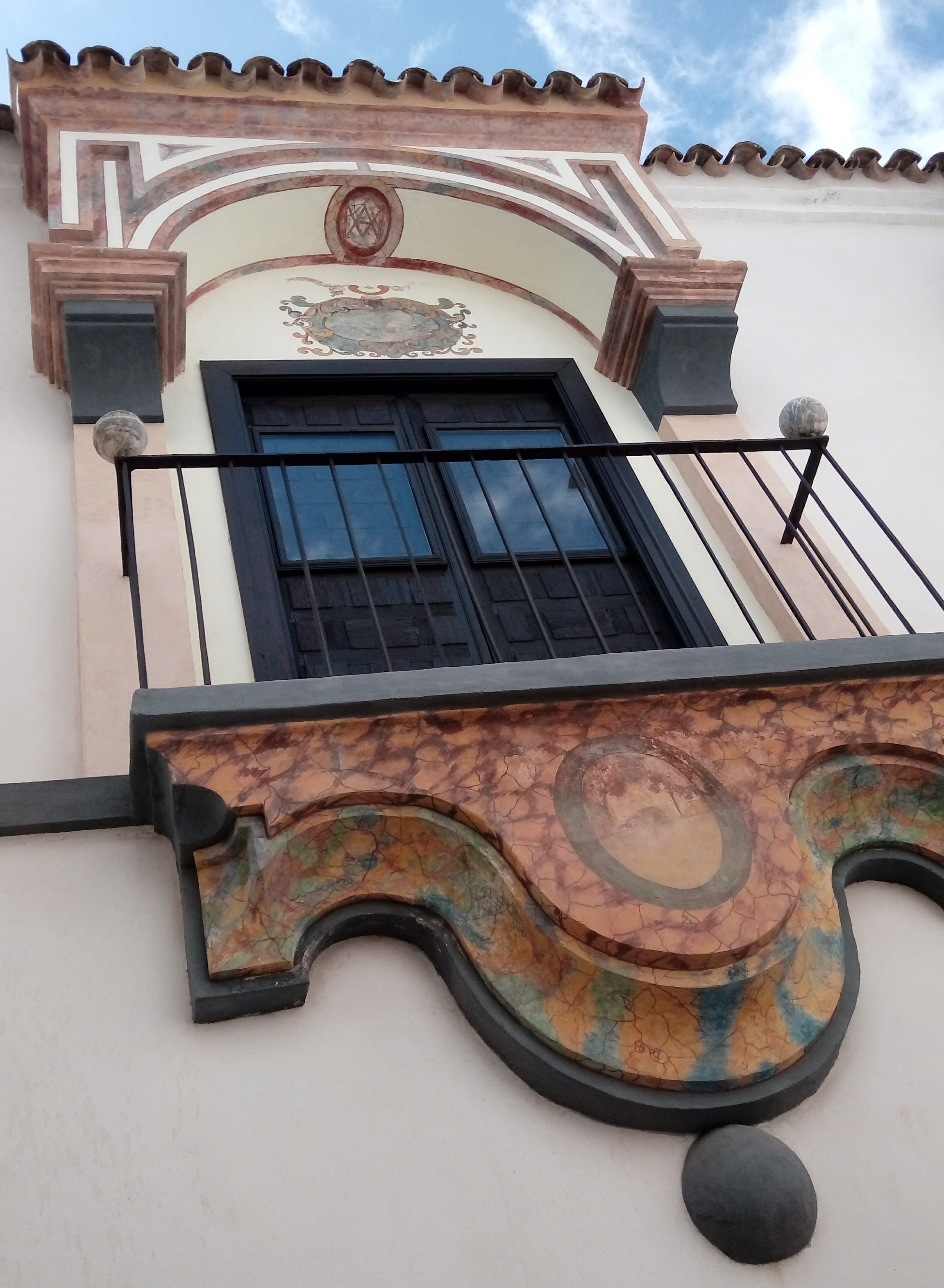 Palacete Barroco del Convento de la Cruz (Córdoba)